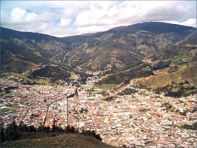 Location: Pamplona, Norte de Santander - Colombia. Web